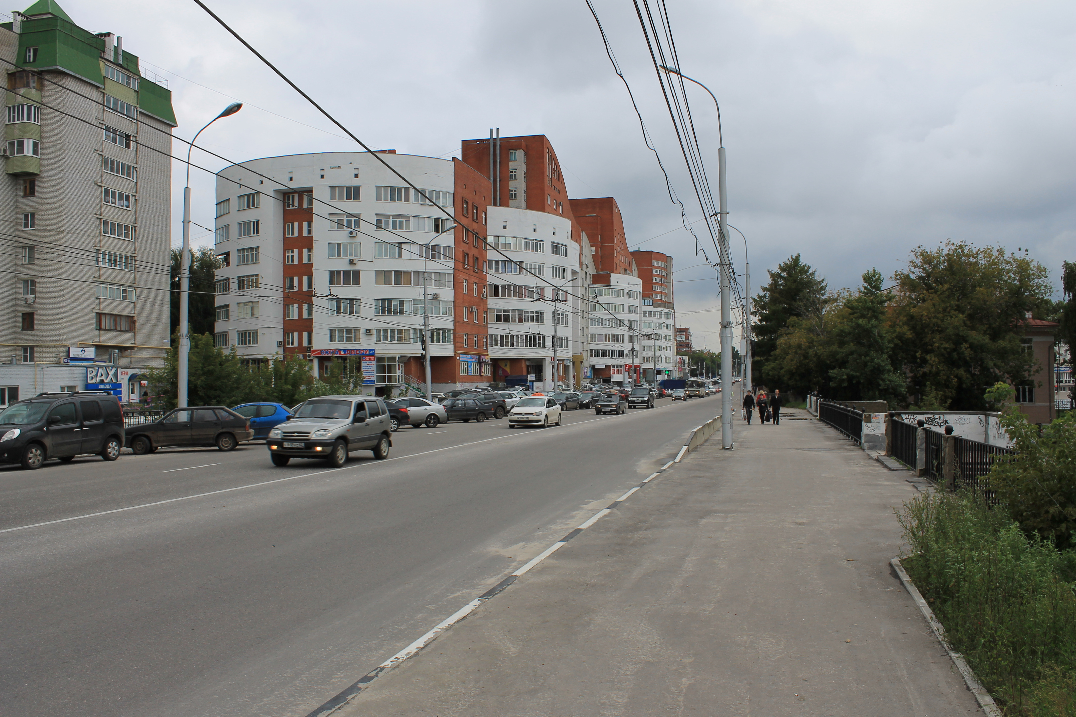 улица Маяковского (Рязань)